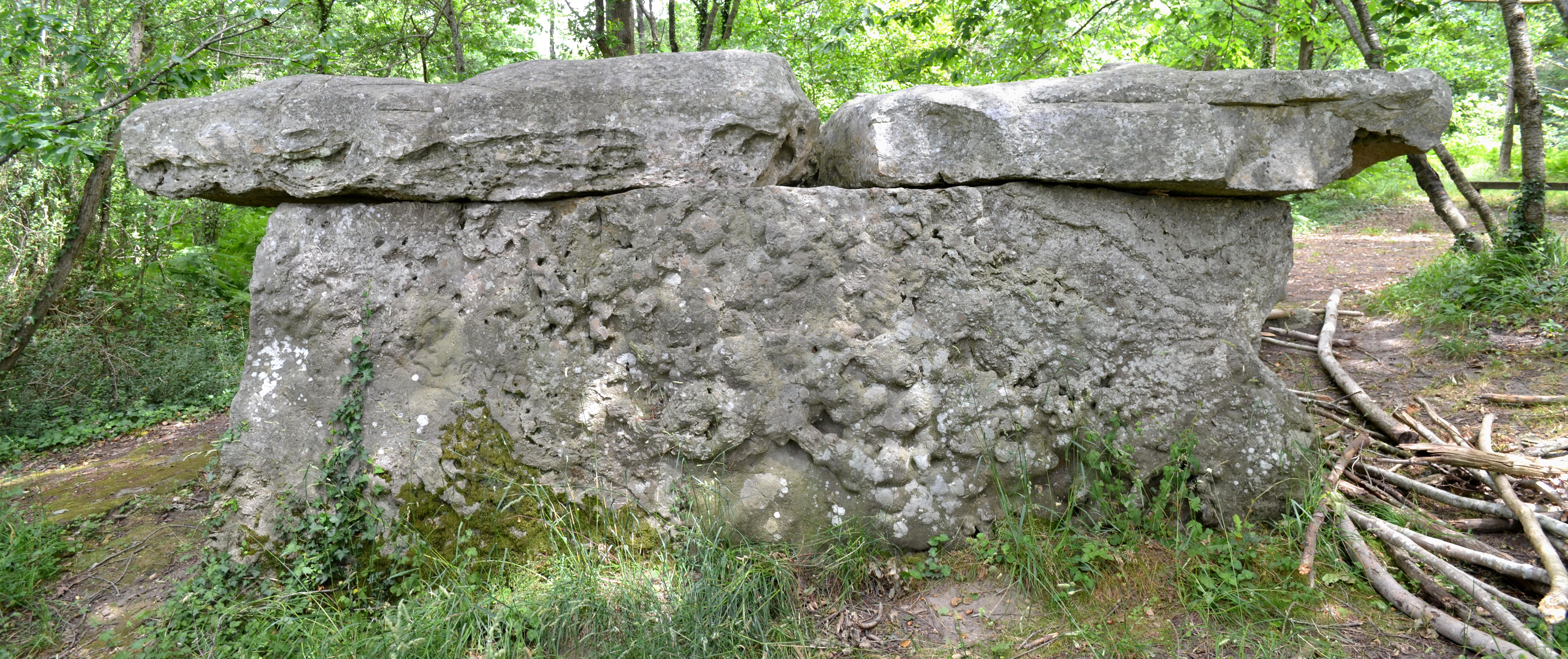 Pierre Couverte du Moulin de Piau à Chemellier (49).